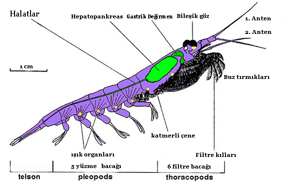 Antarktika krili anatomisi grafiği